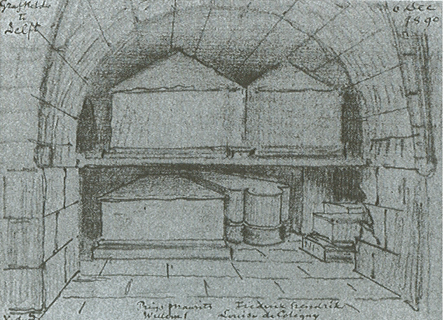 Getekend in december 1890 door Victor de Stuers (1843-1916)